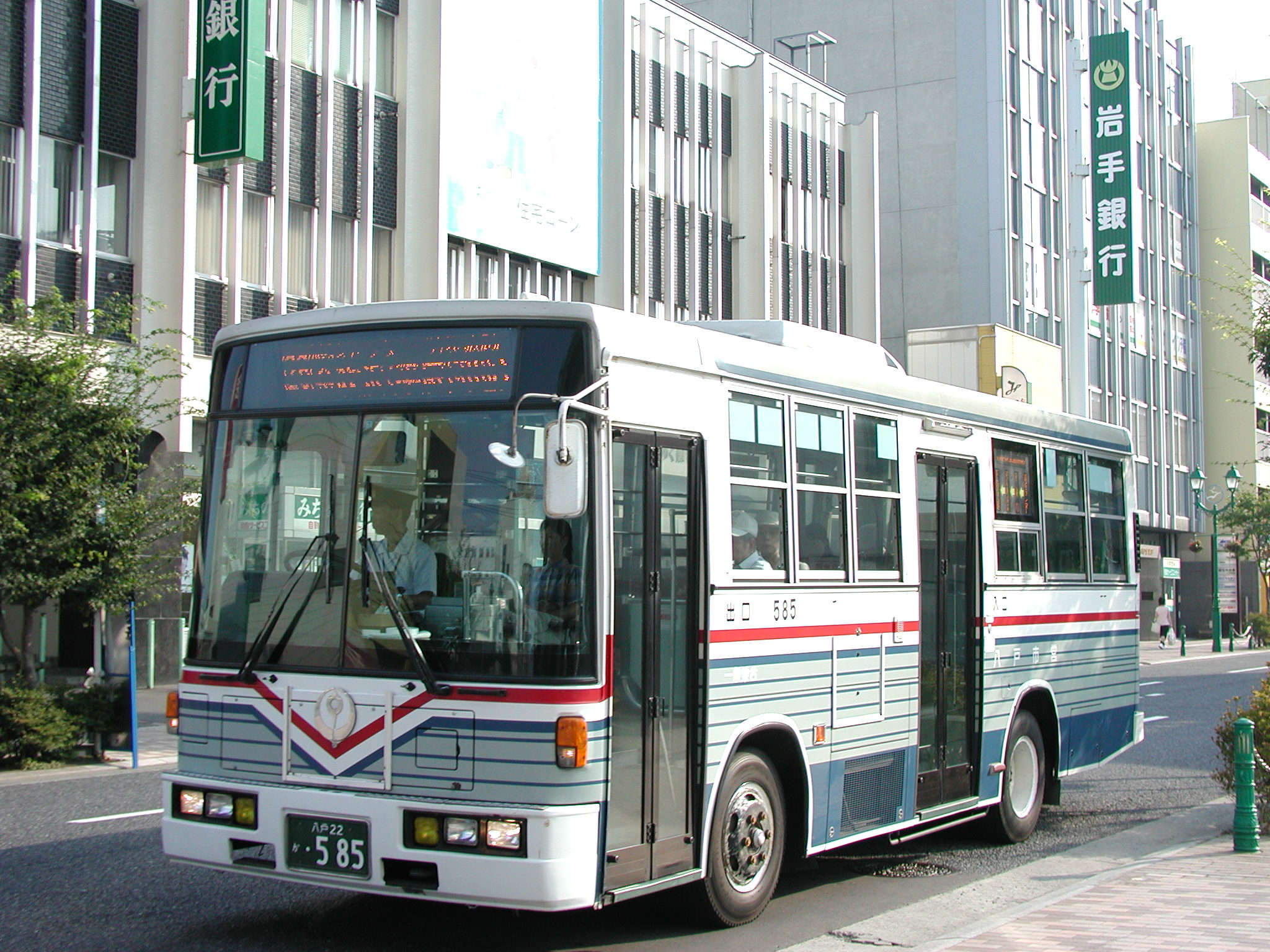 八戸市営バス一般路線塗色（いすゞ・ジャーニーK・KC-LR333F：富士8E架装車） 三日町（BeFM前）付近にて